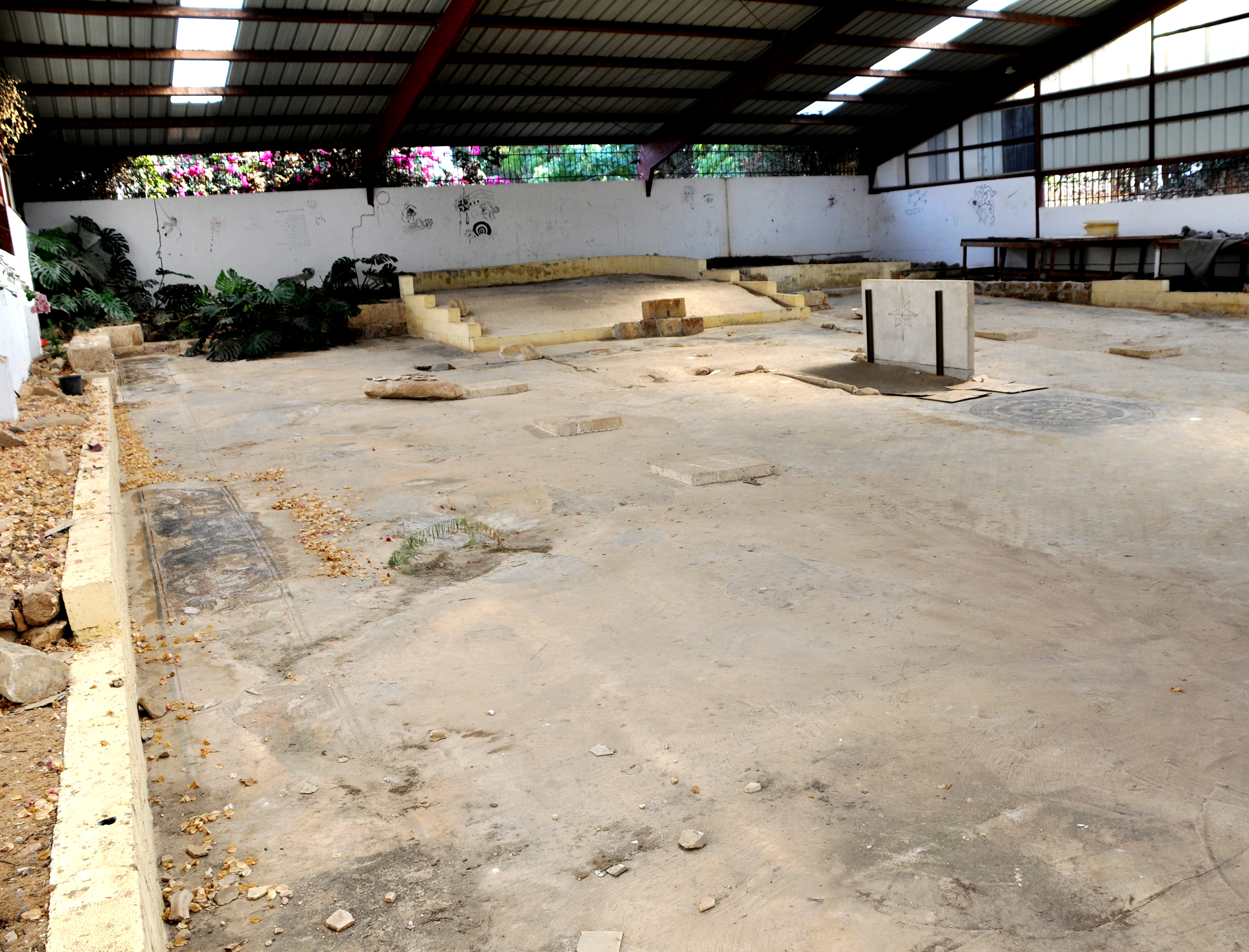 כנסייה מהתקופה הביזנטית ששרידיה נמצאו בשנת 1964 בשכונת "גבעת כצנלסון" בנהריה. שרידי הכנסייה מהמאה השישית כללו רצפת פסיפס הכוללת דמויות אדם ודמויות מעולם החי והצומח ודגמים גאומטריים.